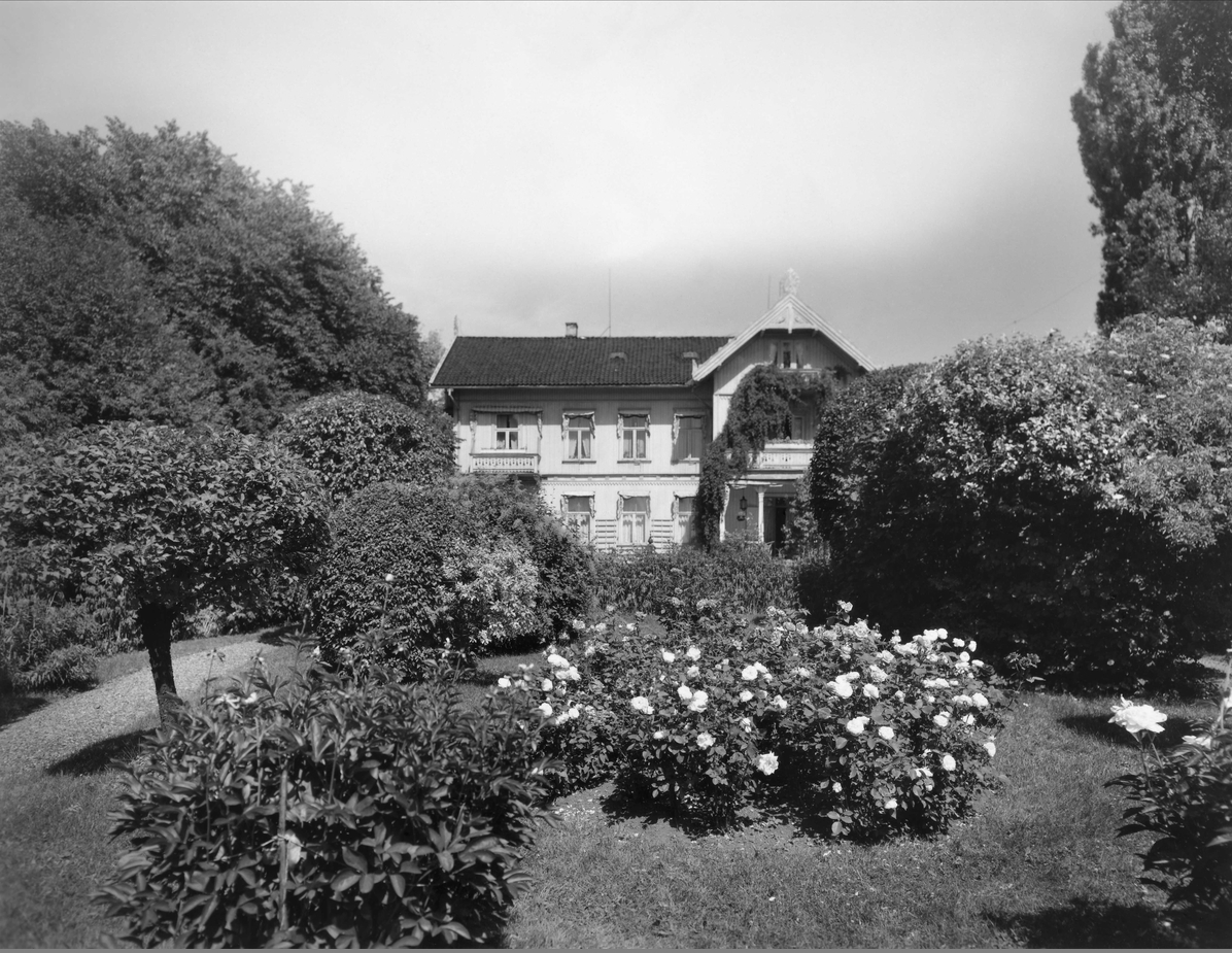 Villa Fjeldstuen stod i sin tid på høydedraget mellom Niels Juels gate og Gabels gate i Oslo, på det som var Dedekams løkke. Husets plassering var der Mogens Thorsens gate 2 er i dag. Ukjent fotograf, ca. 1934. Fra Byhistorisk samling hos Oslo museum.